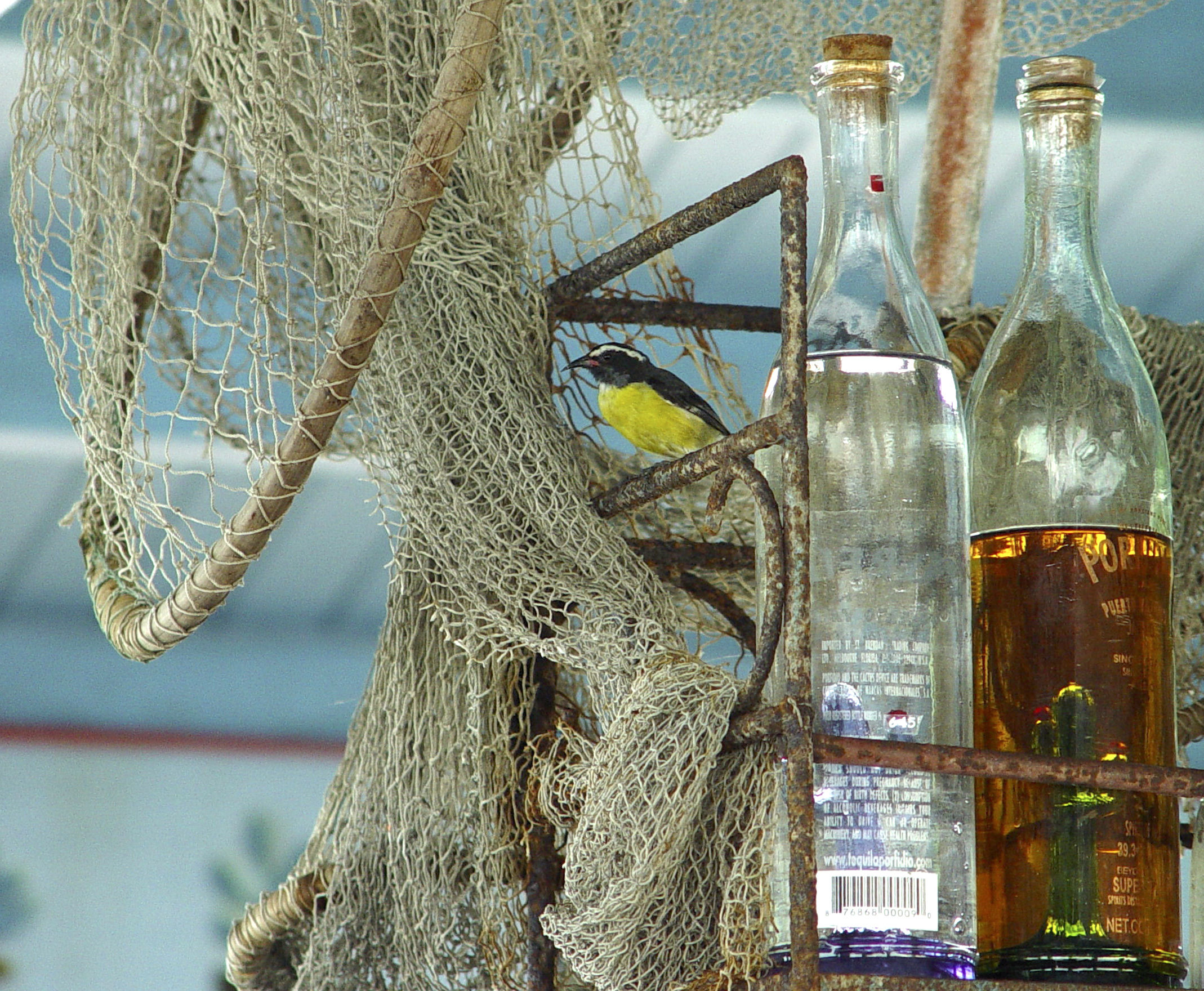 Bananaquit Coereba flaveola, Aruba